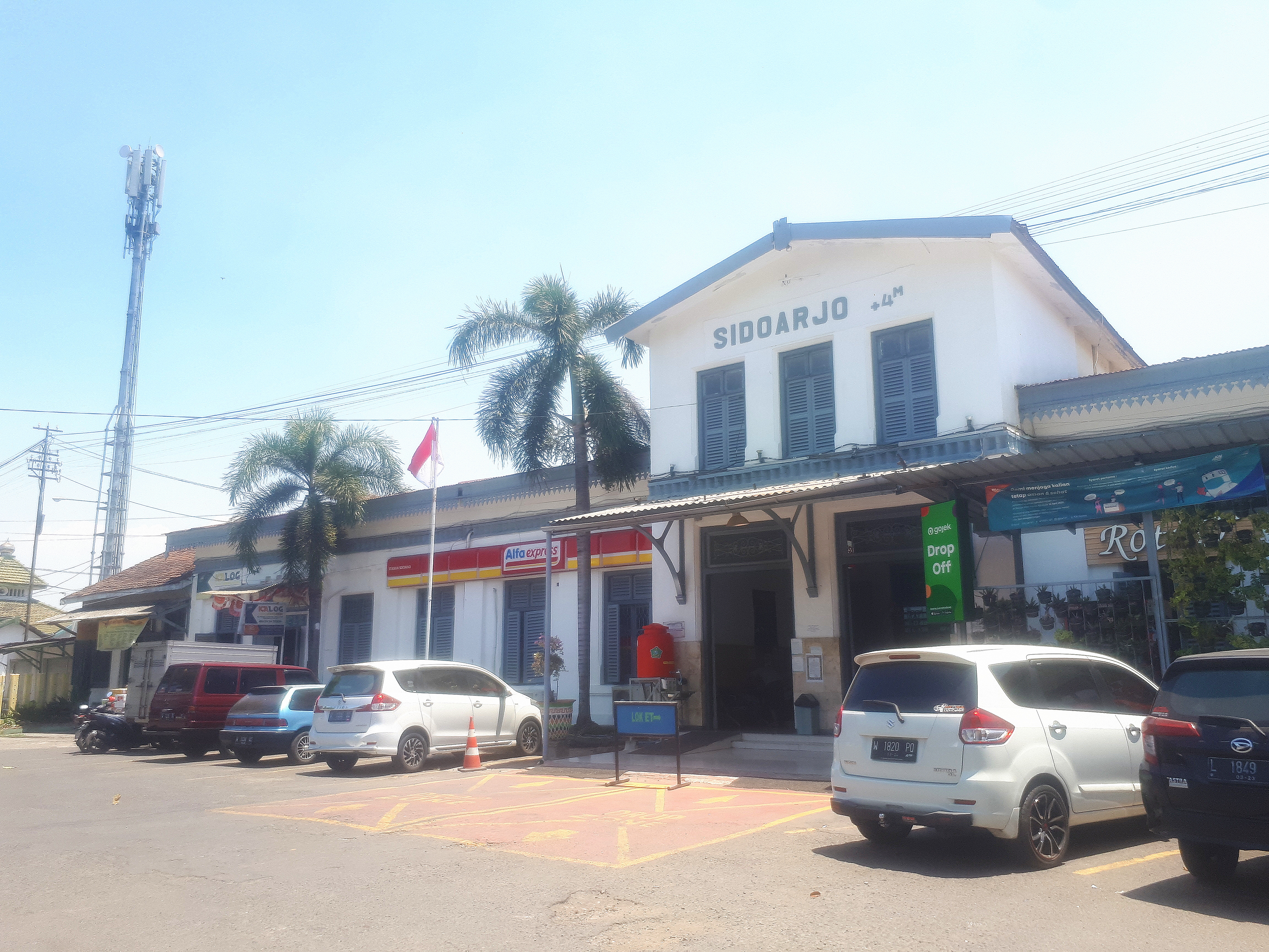 Tampak depan Stasiun Sidoarjo, 2020